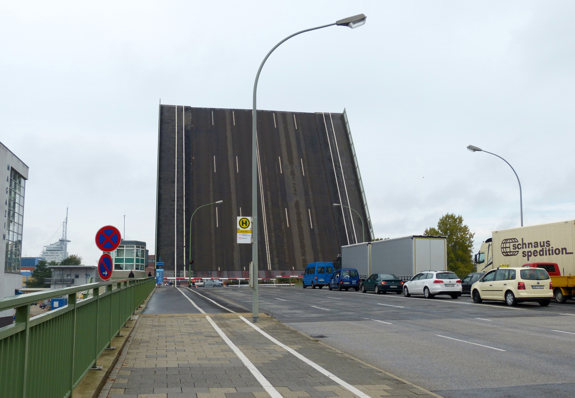 Die geöffnete Kennedybrücke in Bremerhaven. Von Süden aus gesehen.